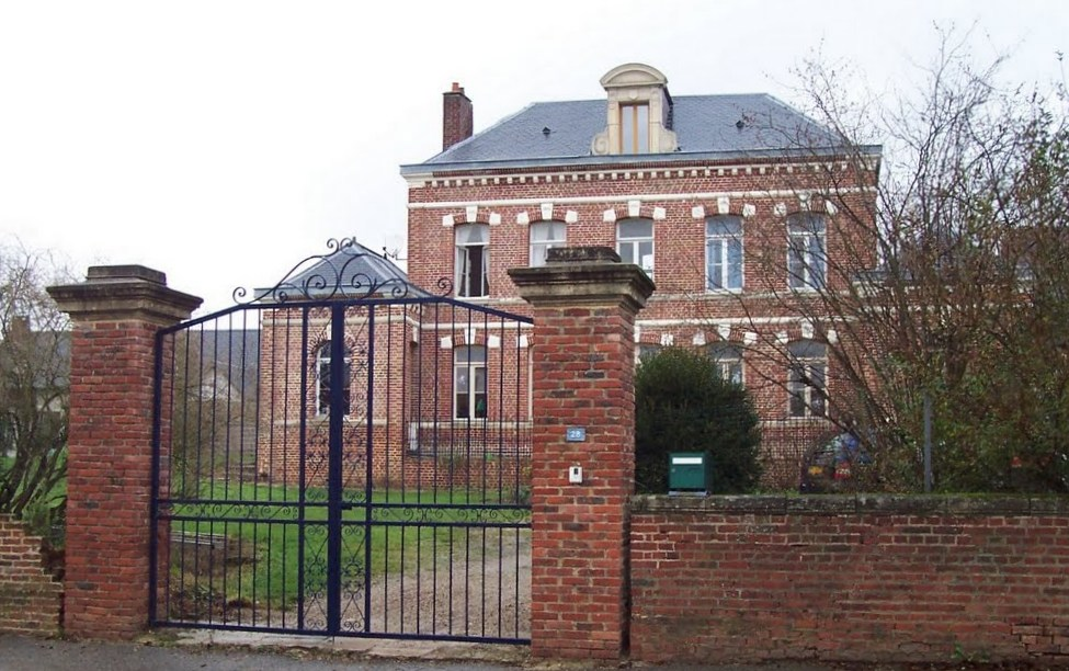 Architecture locale.